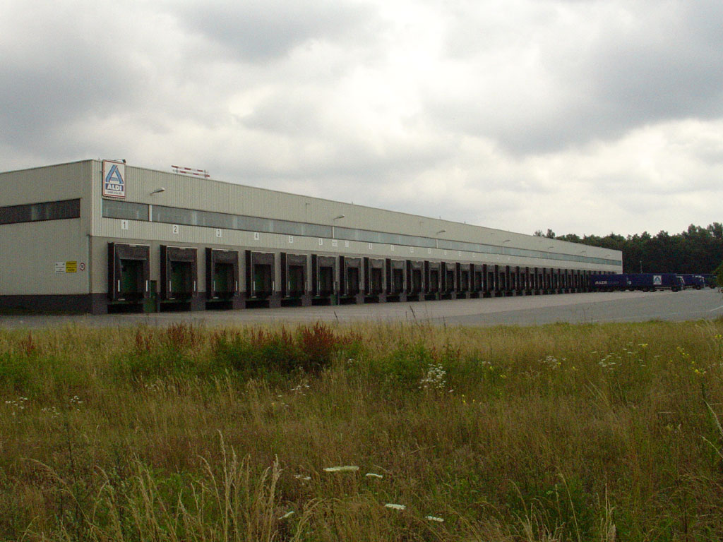 Zentrallager von Aldi Nord in Schloß Holte-Stukenbrock; Ortsteil Liemke